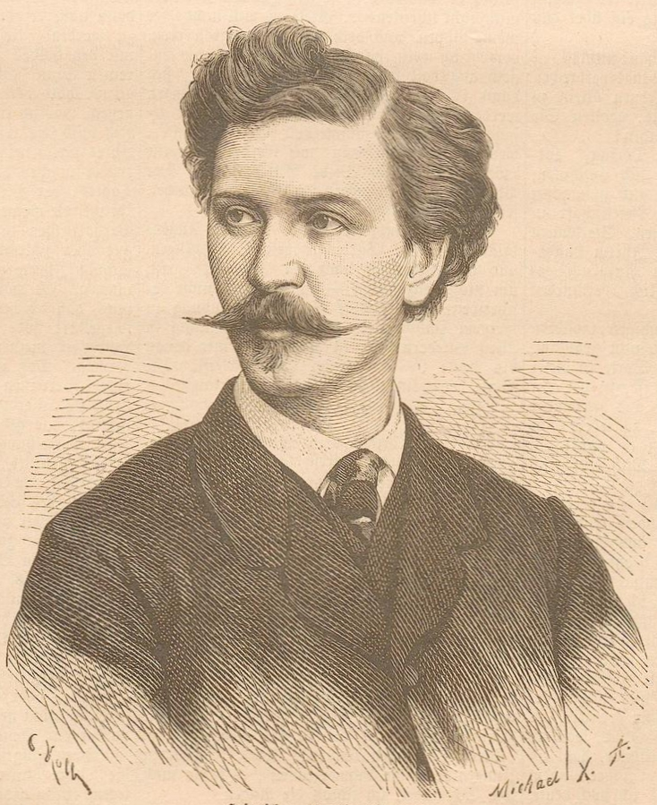 Heinrich von Angeli. In: Illustriertes Unterhaltungs-Blatt: wöchentliche Beilage zum Darmstädter Tagblatt. Darmstadt, 1886